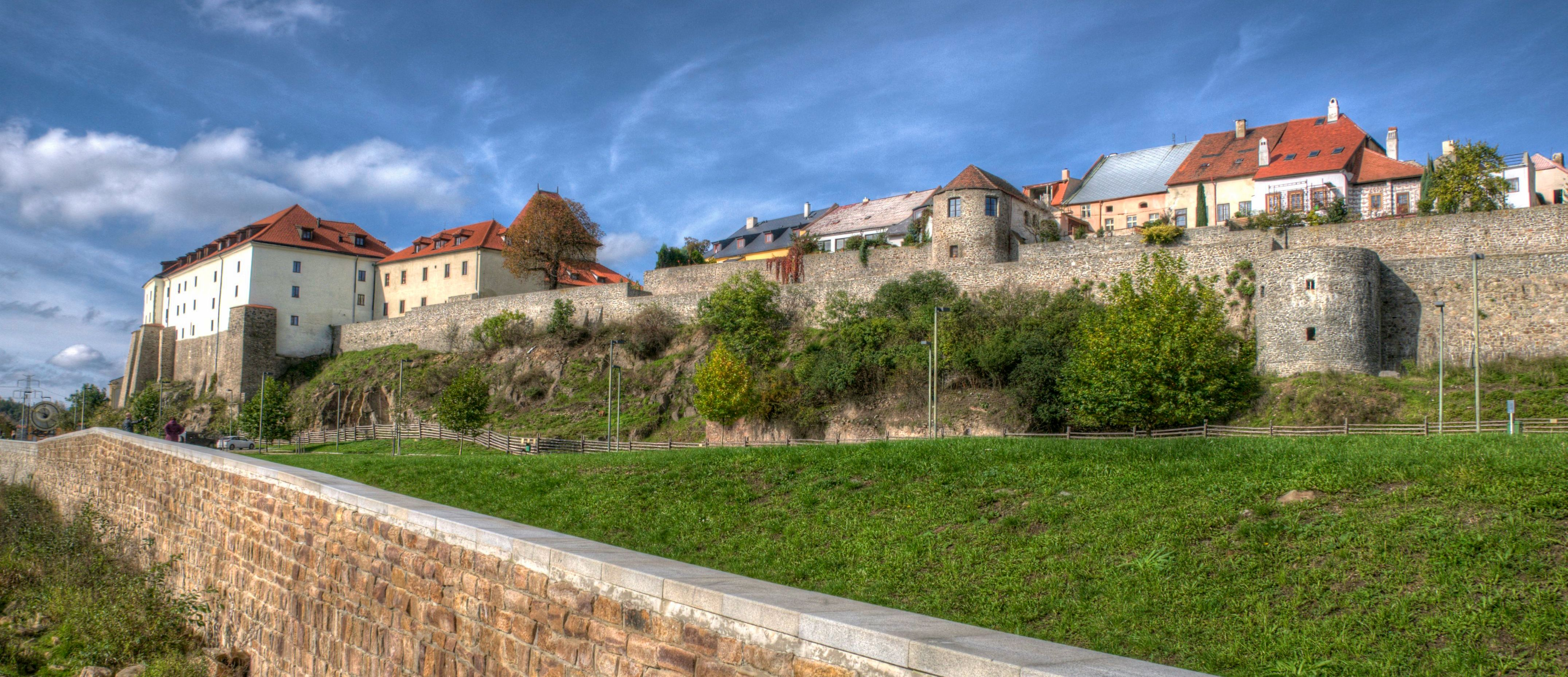 Hrad Kadaň, Tyršova 567, Kadaň.